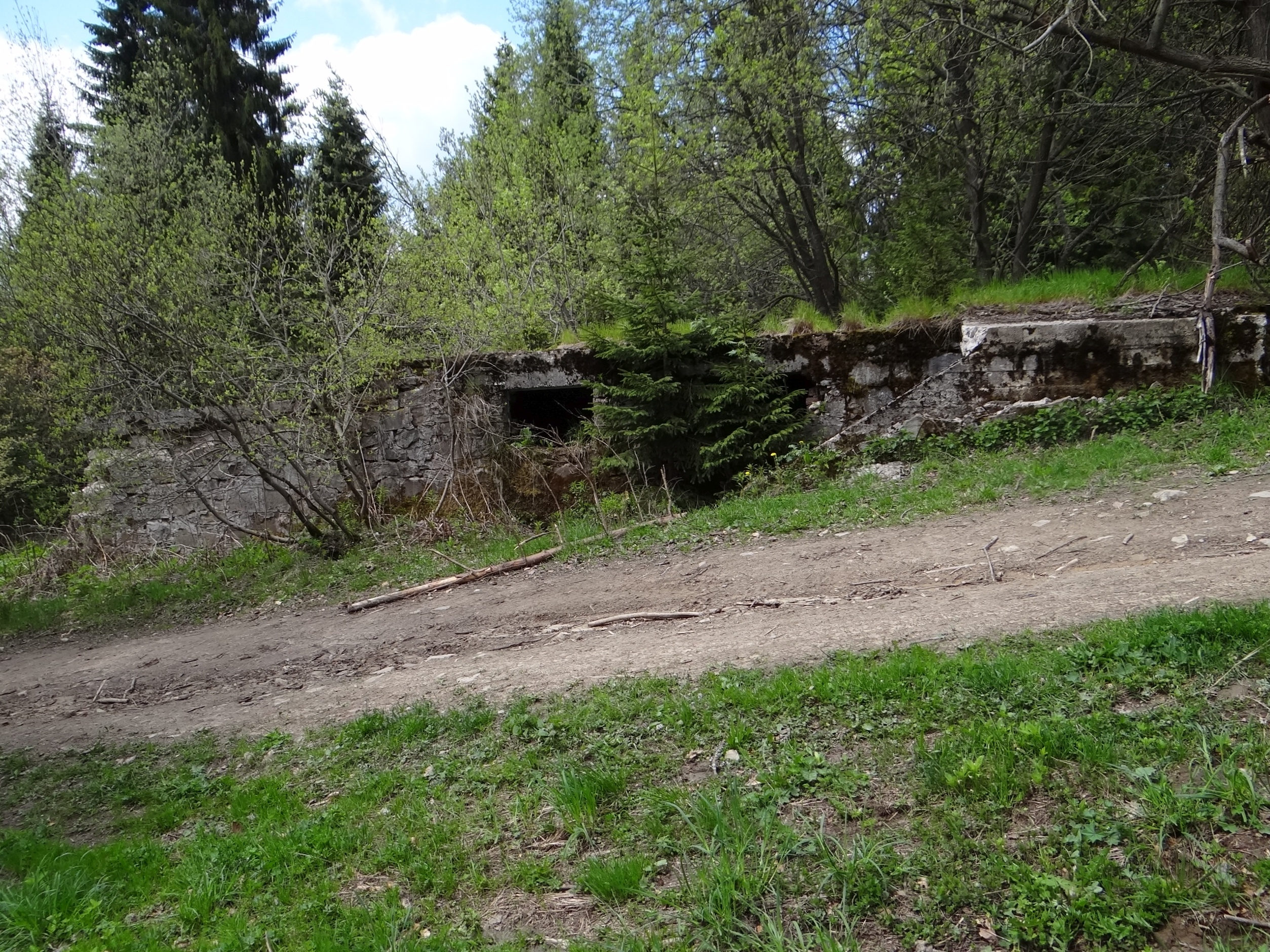 Ruiny dawnego schroniska na polanie Wyrobek pod Lubaniem